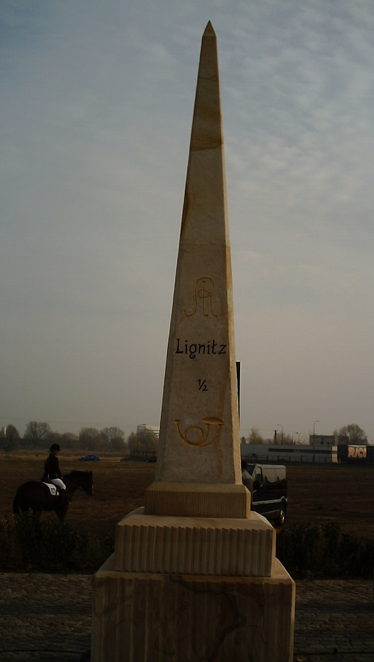 Preußischer Ganzmeilenobelisk als Kursächsische Ganzmeilensäule in Legnica (Liegnitz)